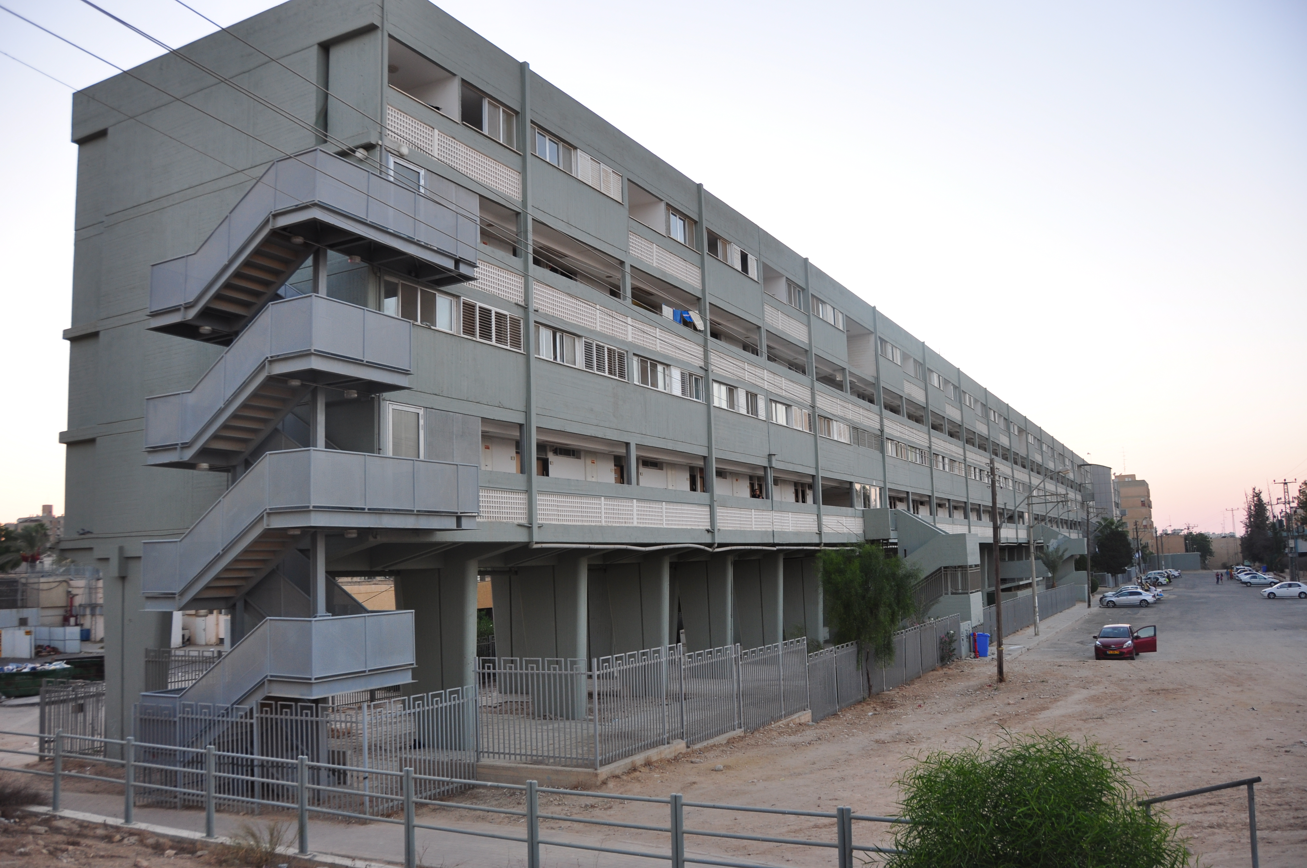 בניין מגורים בתכנון האדריכלים אברהם יסקי ואמנון אלכסנדרוני, בשכונה ה' בבאר שבע. הבניין מכונה "שיכון רבע קילומטר" בשל אורכו הרב, ההופך אותו למבנה הארוך ביותר בישראל.